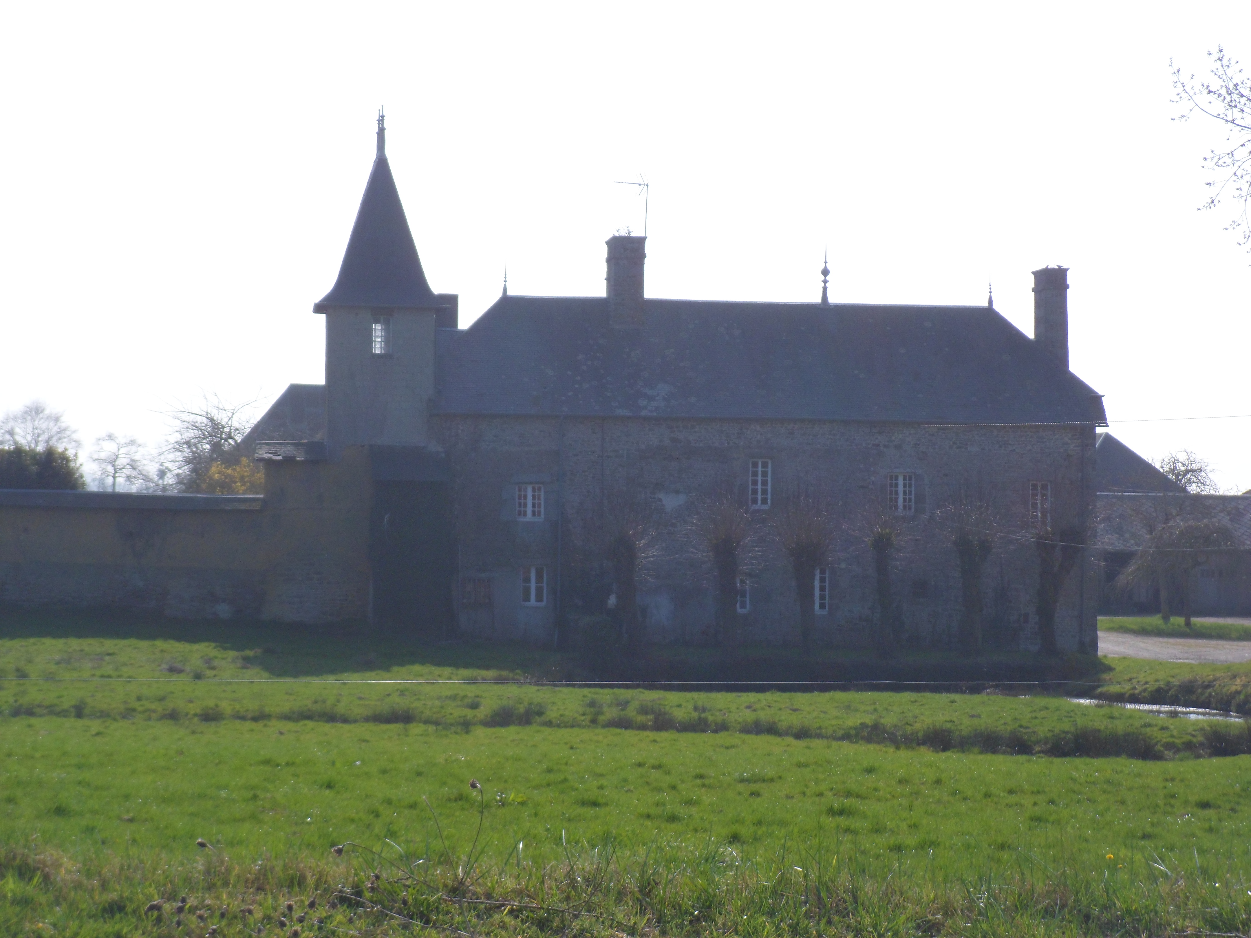 Manoir du Guislain